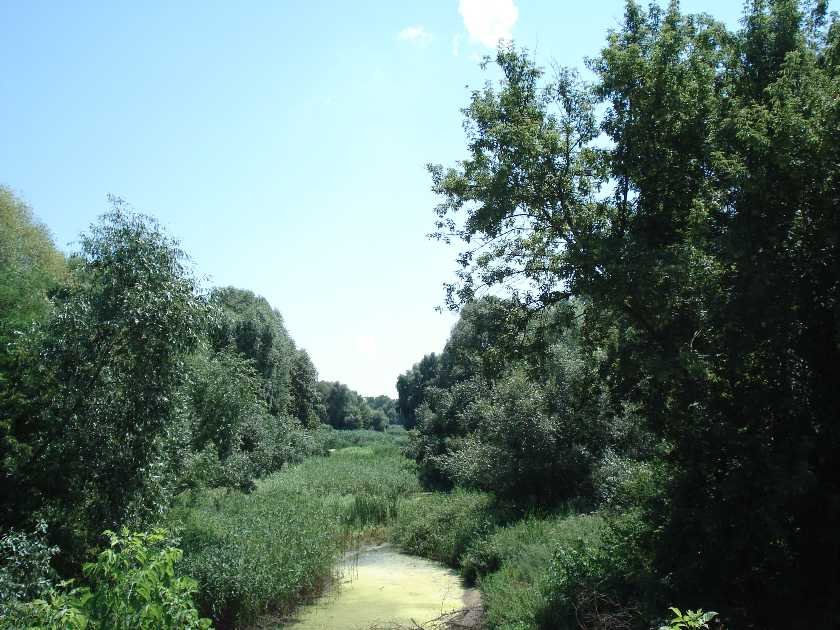 Найпівнічніша частина ставка у селі Великий Крупіль Згурівського району Київської області, яка обміліла